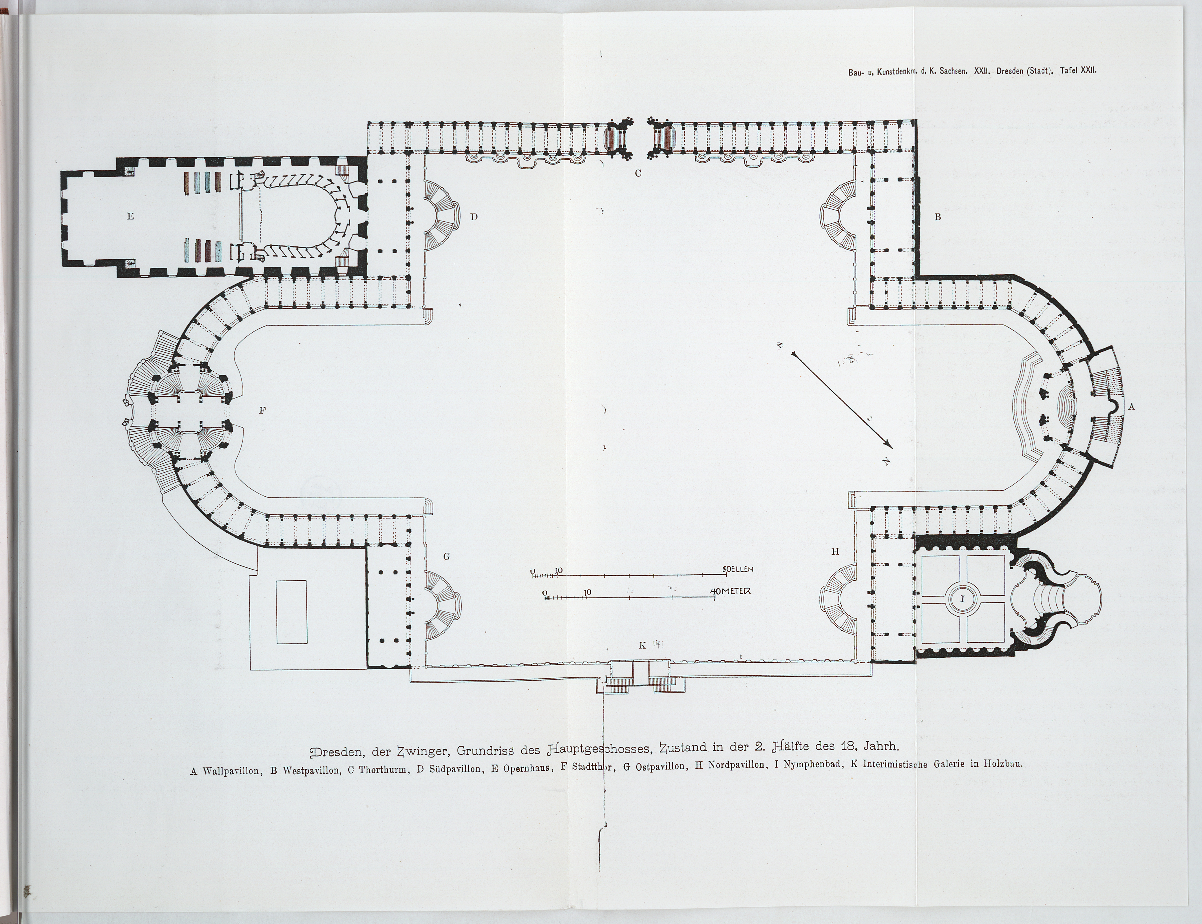 siehe Bildbeschreibung aus: Beschreibende Darstellung der älteren Bau- und Kunstdenkmäler des Königreichs Sachsen. 21, 22, und 23. Heft: Stadt Dresden Meinhold, Dresden 1903